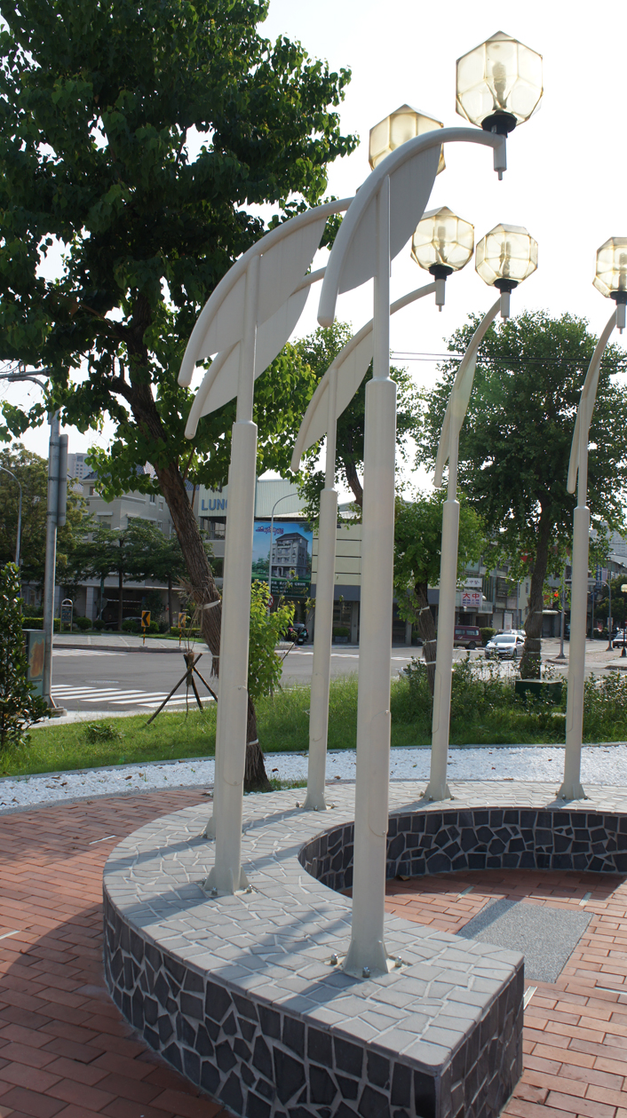 臺中市育德園道與梅川東路口的公共藝術